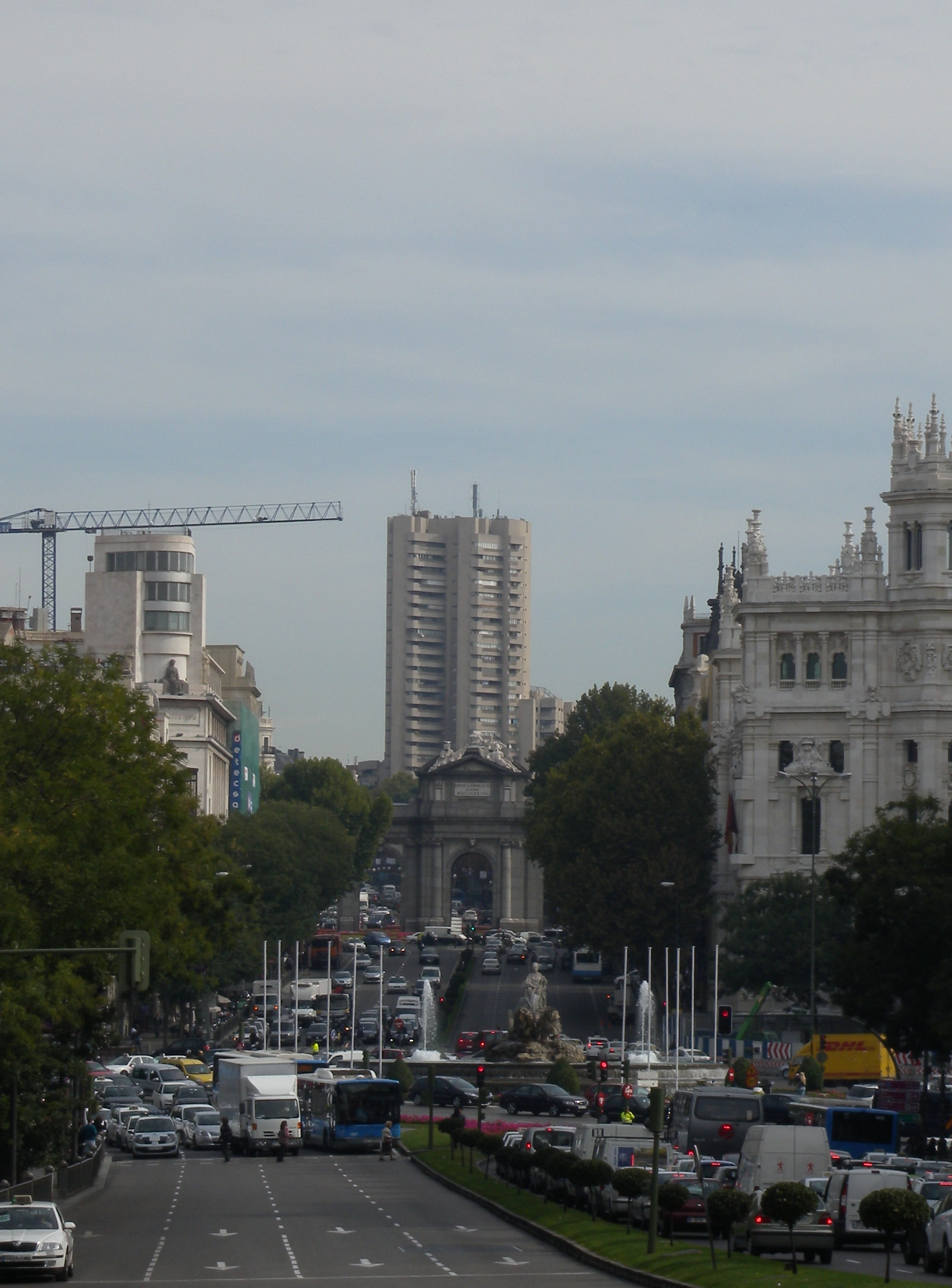 Está situada en el cruce de la Avenida de Menéndez Pelayo con la calle de O'Donnell en Madrid, frente a una de las esquinas del Retiro. Con sus 94 metros de altura y 28 plantas es el decimoquinto edificio de mayor altura de la capital española. Fue proyectado con fines residenciales en 1968 por el arquitecto Javier Carvajal, y construido entre los años 1970 y 1973, siendo alcalde el futuro presidente del Gobierno con Franco, Carlos Arias Navarro. La Torre de Valencia se erige en el exiguo solar donde hubo un parque de bomberos y, pese a su indudable calidad arquitectónica, ha sido arduamente criticada por romper en exceso con el resto de edificios cercanos y, sobre todo, por estar demasiado presente en la perspectiva que se tiene desde la Plaza de Cibeles hacia la Puerta de Alcalá. Ante las fuertes críticas, hubo que paralizar las obras, hasta que se reanudaron el verano siguiente, aprovechando el paréntesis vacacional de los ciudadanos.